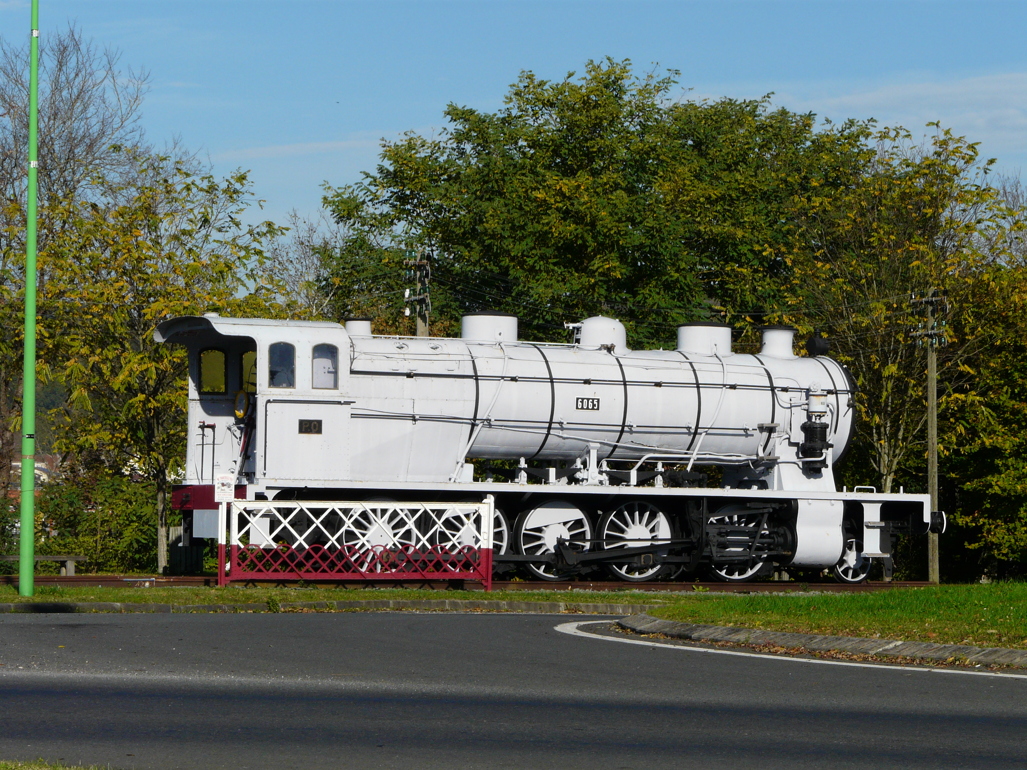 La locomotive Franco-Belge 6065 PO (mise en service en 1913) au rond-point de Mériller, Coulounieix-Chamiers, Dordogne, France.